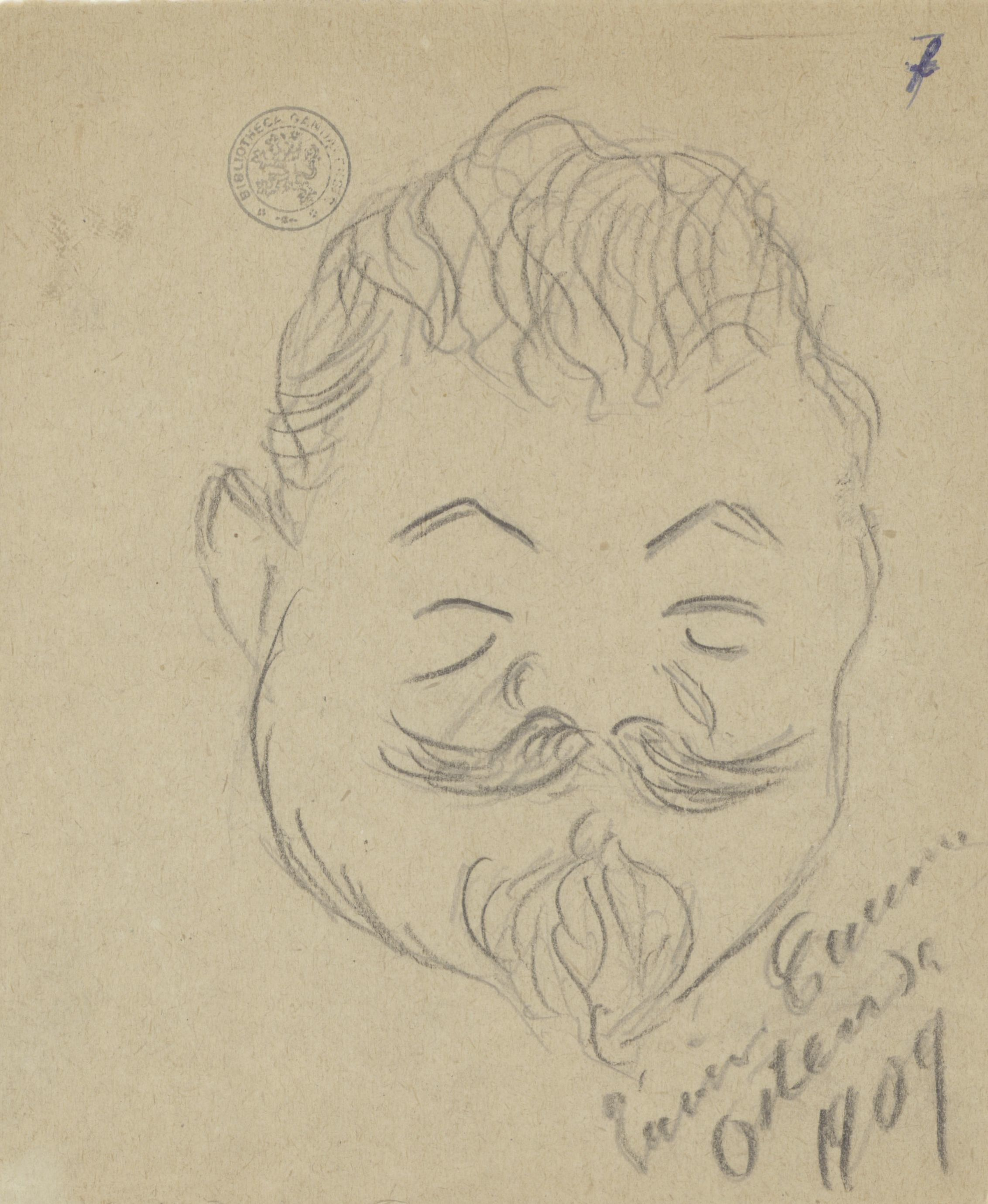 Portret van Guillaume Guidé verzamelband karikaturen getekend door Enrico Caruso (1906 & 1909, Universiteitsbibliotheek Gent)